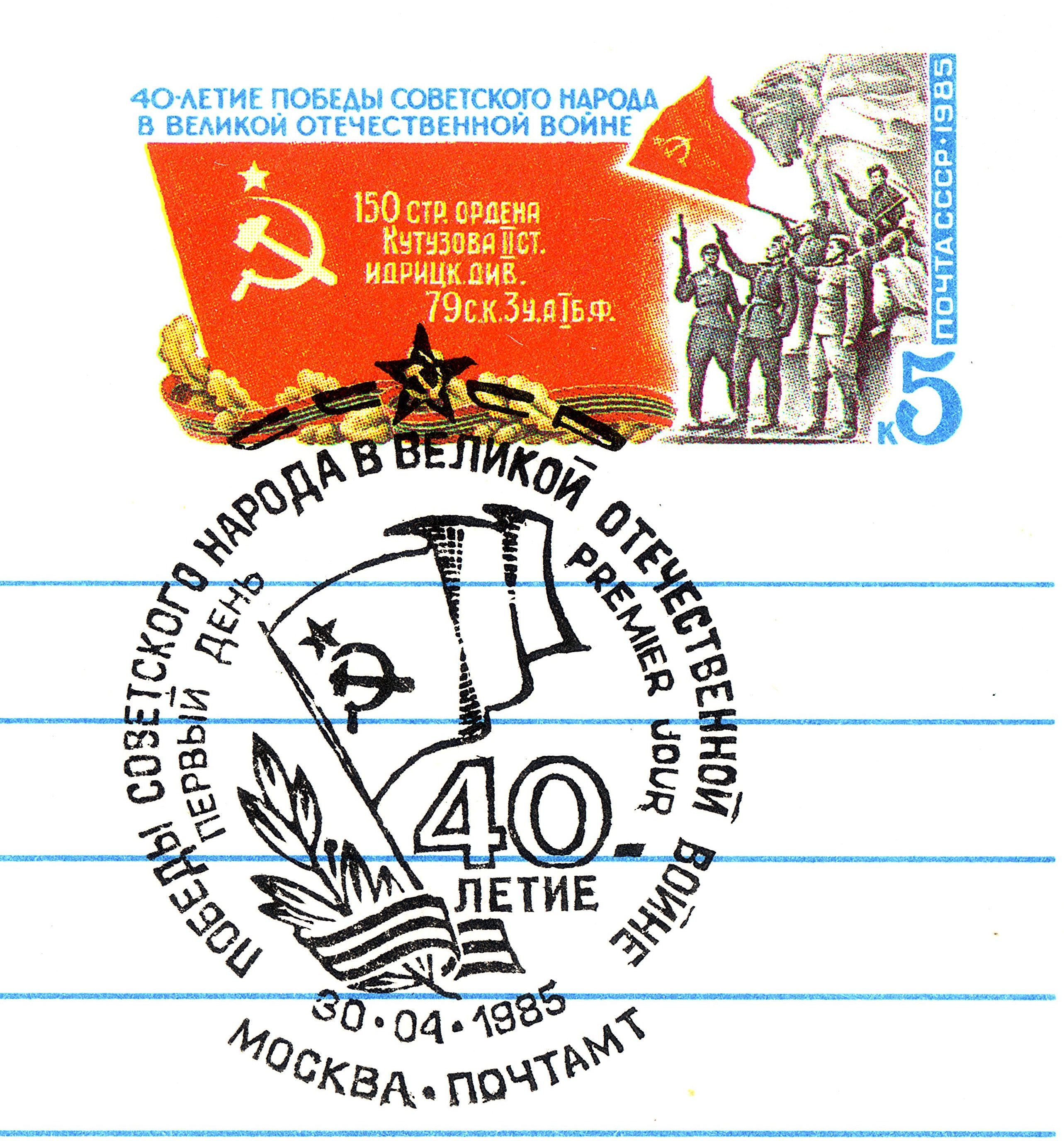 USSR original stamp 1985: Victory Day 40 Anniversary. Red flag on the Brandenbourg Gate in 9/05/1945 , Berlin. 40-летие Победы советского народа в Великой Отечественной войне. Изображены Бранденбургские ворота в Берлине. Почтовый конверт СССР с оригинальной маркой и гашением первого дня на Главпочтамте Москвы 30 апреля 1985. Дата подписания в печать - 16 января 1985. Тираж не указан.